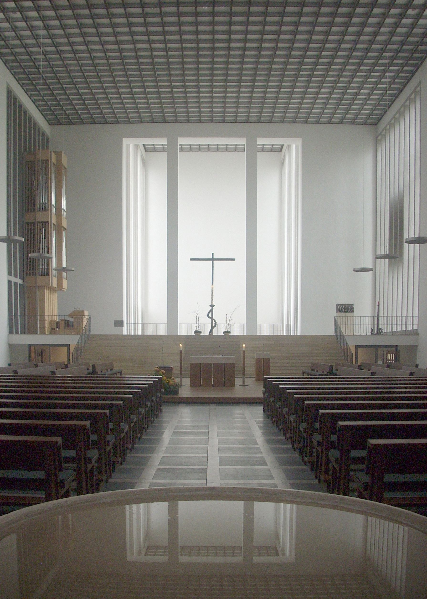 Dülmen, Hl.-Kreuz-Kirche, Inneres